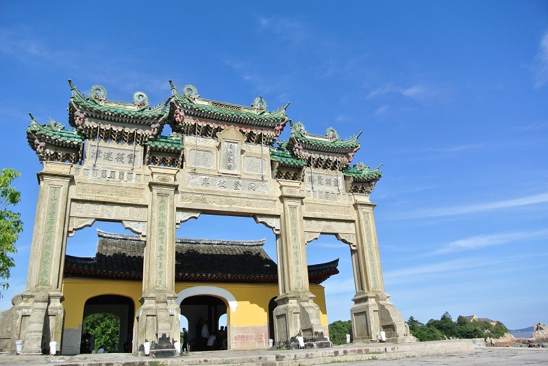 浙江省普陀山牌坊